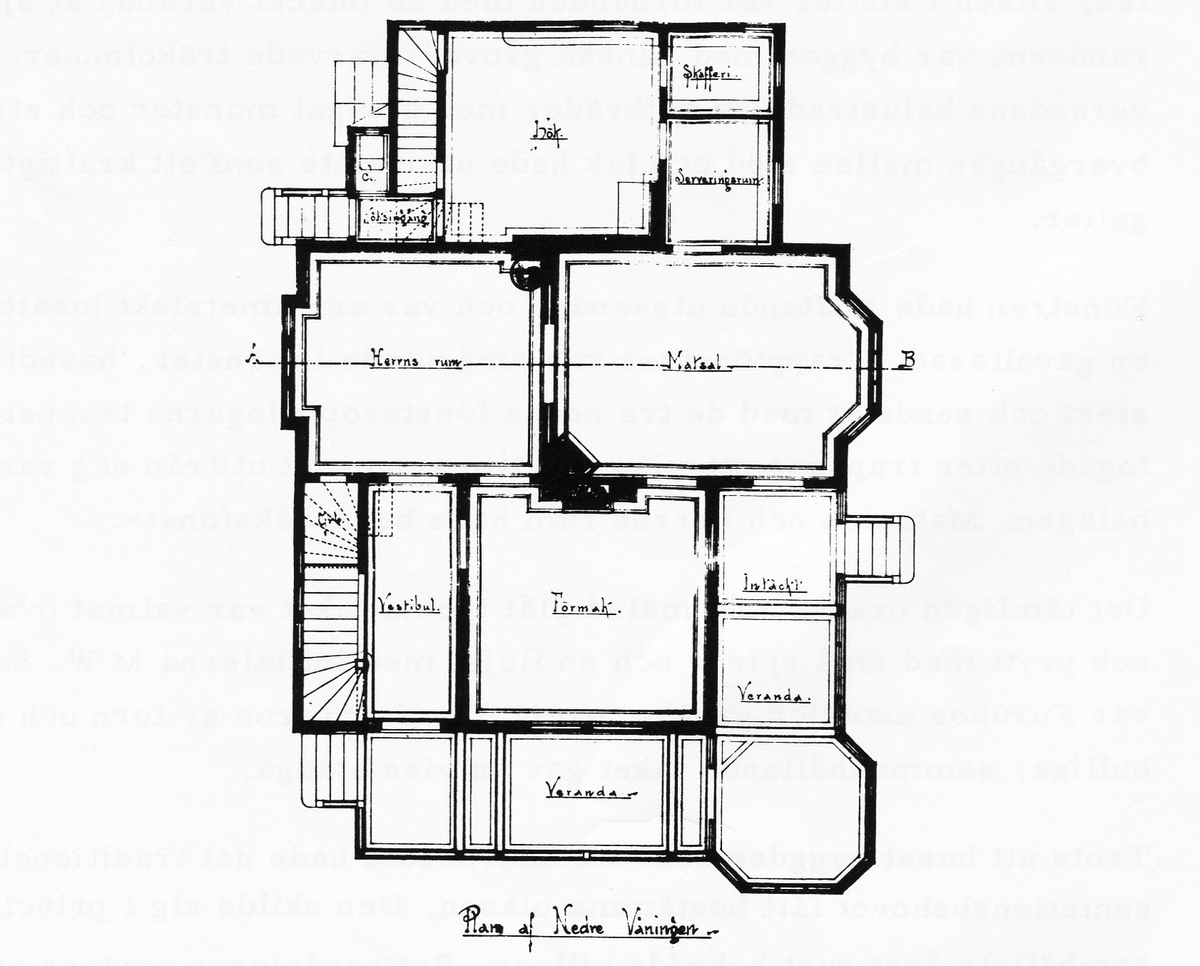 Villa Furubo i Saltsjöbaden, plan bottenvåning (numera riven)